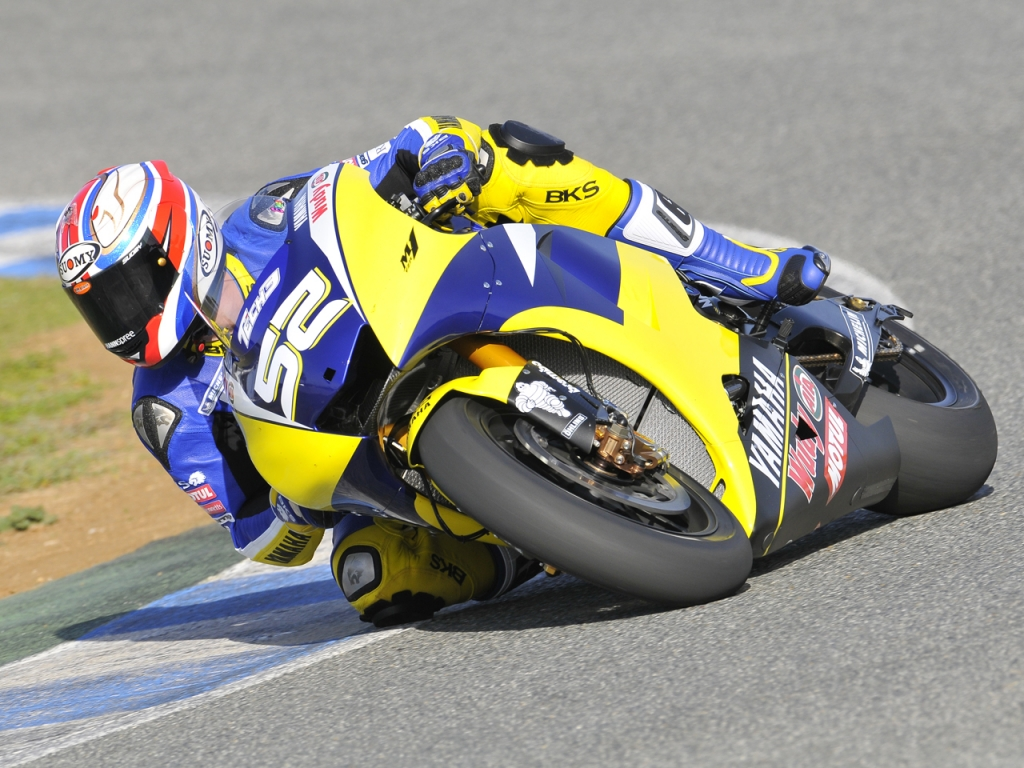 James Toseland in IRTA Jerez Test 2008